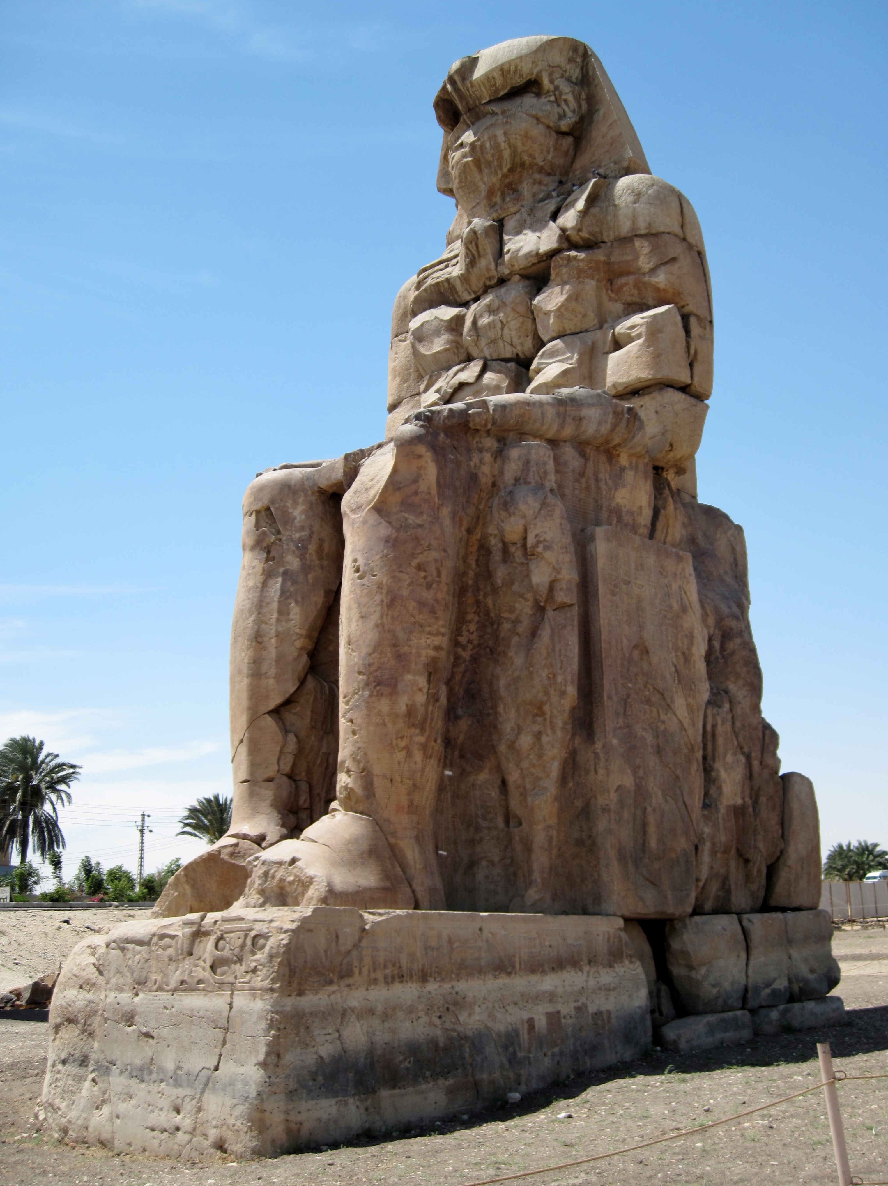 Der nördliche der Memnonkolosse in Theben-West (bei Luxor), Ägypten